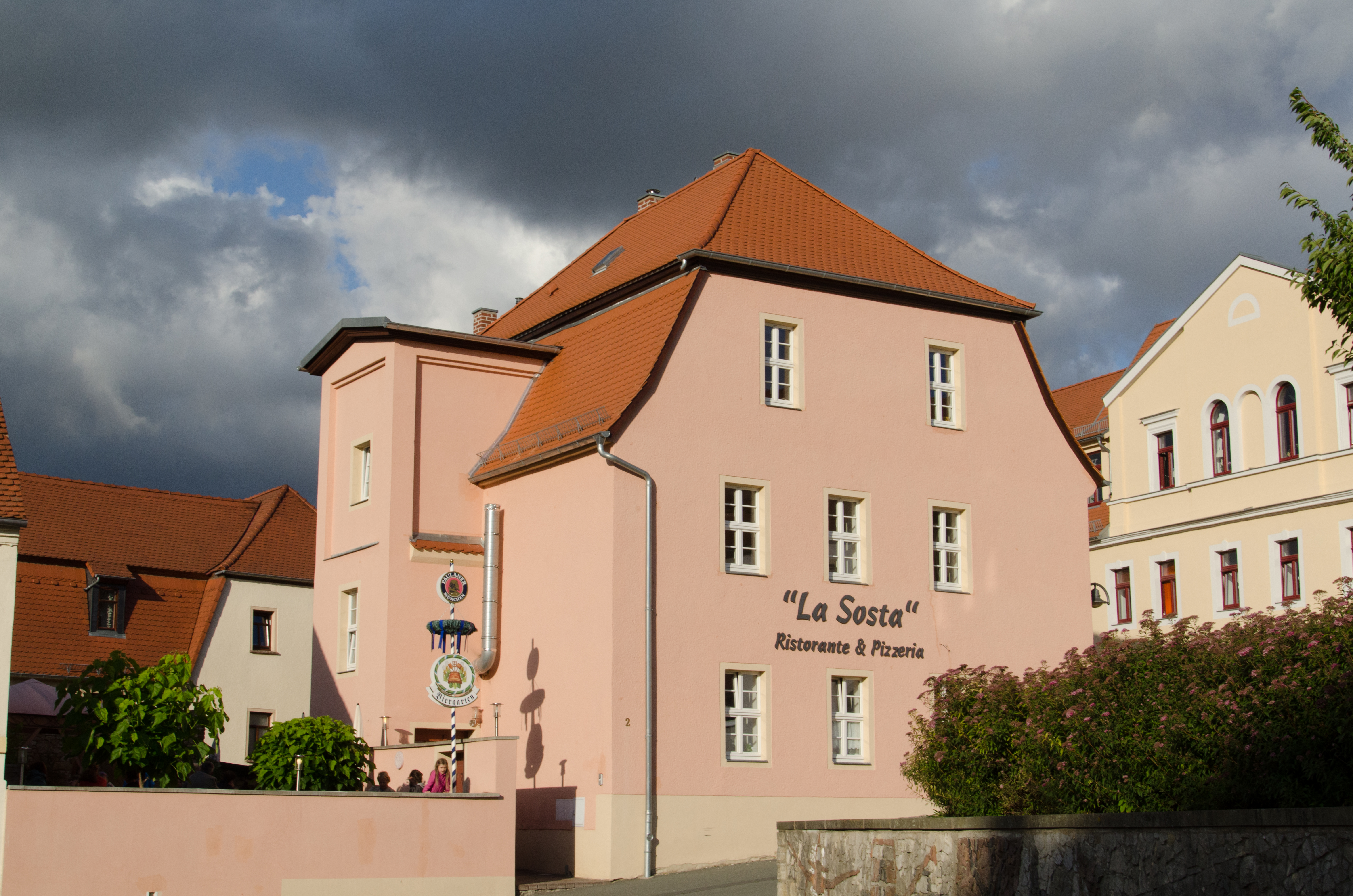 Querfurt, Graben 2